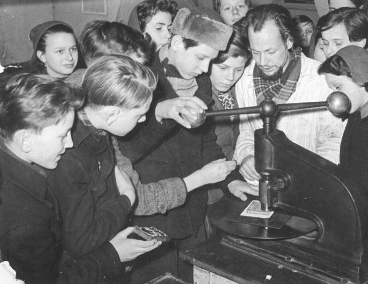 Leipzig, Jugendstunde in der Kunsthochschule Zentralbild Bez. Red. Leipzig 14.2.1956 Rössing Sterntreffen der Teilnehmer an der Jugendweihe in Dresden Einen wichtigen erzieherischen Beitrag zur Erkennbarkeit der Entstehung der Erde und der Vorgänge auf ihr leisten die Jugendstunden, die den Jugendlichen die fortschrittliche Weltanschauung wissenschaftliche nahebringen. In der Wilhelm-Wander-Schule haben die beispielhaft durchgeführten Jugendstunden zu einer Verdreifachung der Teilnehmerzahl seit September 1954 geführt. So besuchten die Teilnehmer an den Jugendstunden die Hochschule für Grafik und Buchkunst in Leipzig, um einen Einblick in die interessante Arbeit der Hochschule zu bekommen. UBz: In der Abteilung Holzschnitt. Kollege Zürner erklärt den aufmerksamen Schülern die Entstehungsweise eines Holzschnitts.